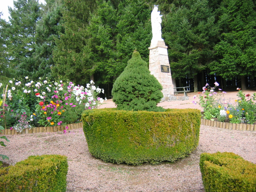 jardin à la française devant notre dame des pins dorées - la Chapelle-de-Mardore à Thizy-les-Bourgs (Rhône).